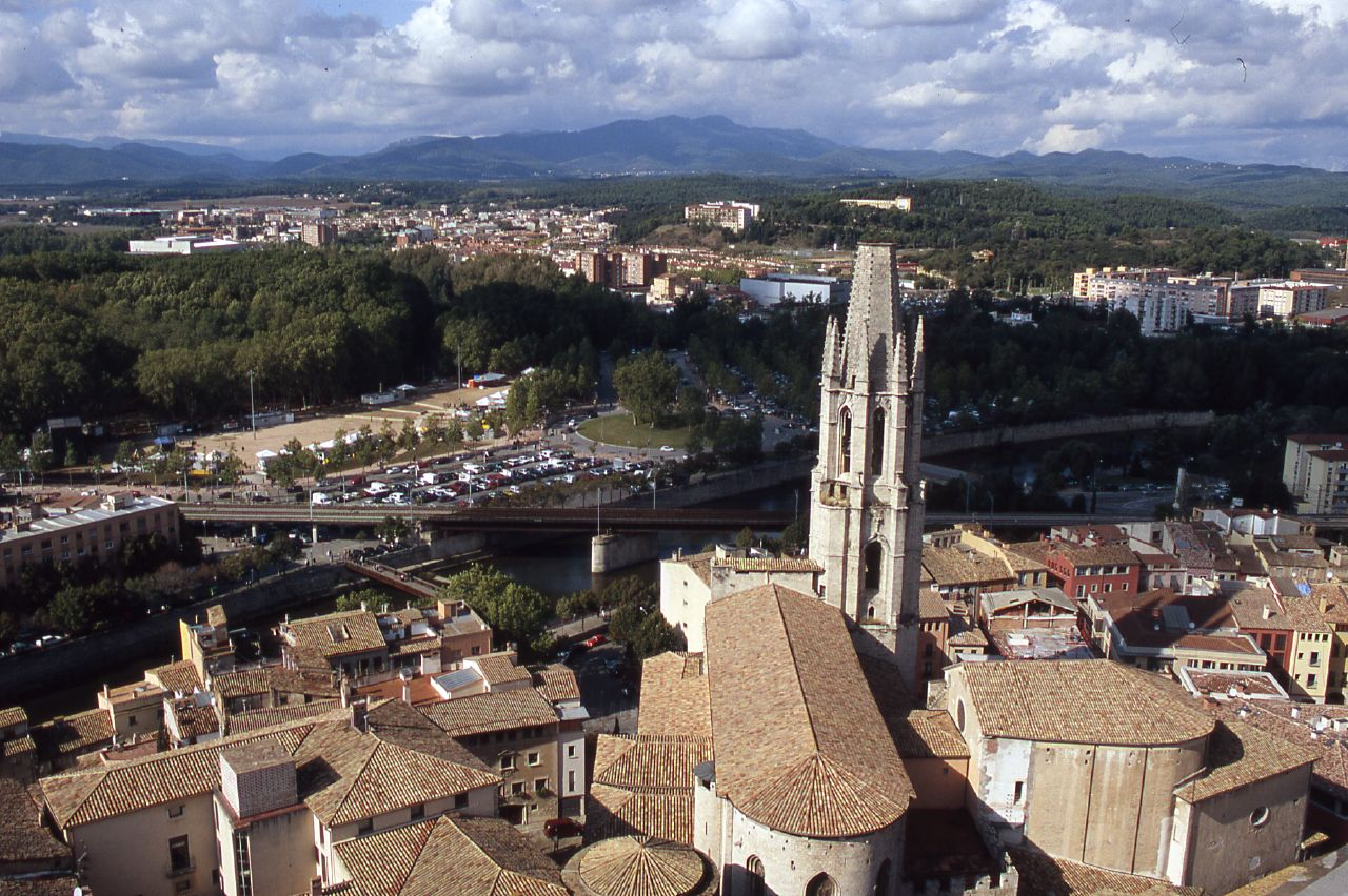 Sant Feliu i la Devesa des del campanar de la catedral de Gironaimg071